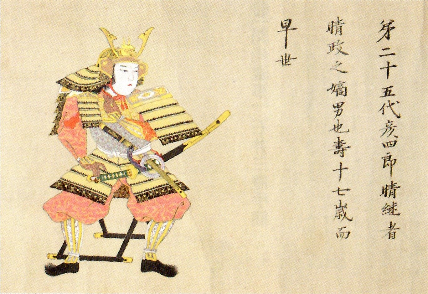 南部晴継の肖像。